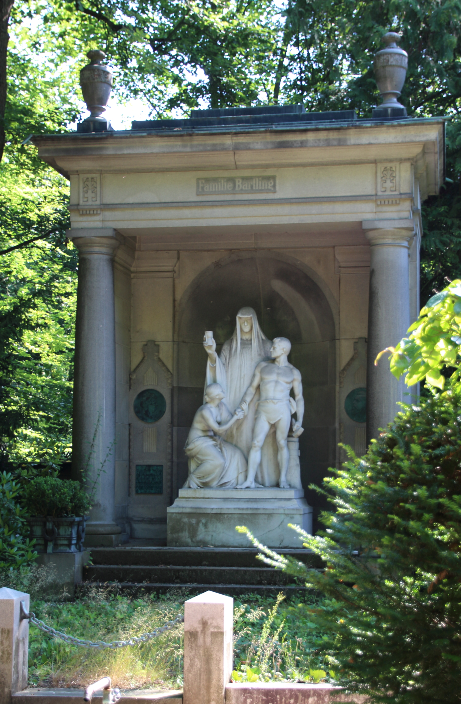 Grabmal Familie Eduard Bartling (1845-1927). Bildhauer: Ernst Herter. Nordfriedhof Wiesbaden